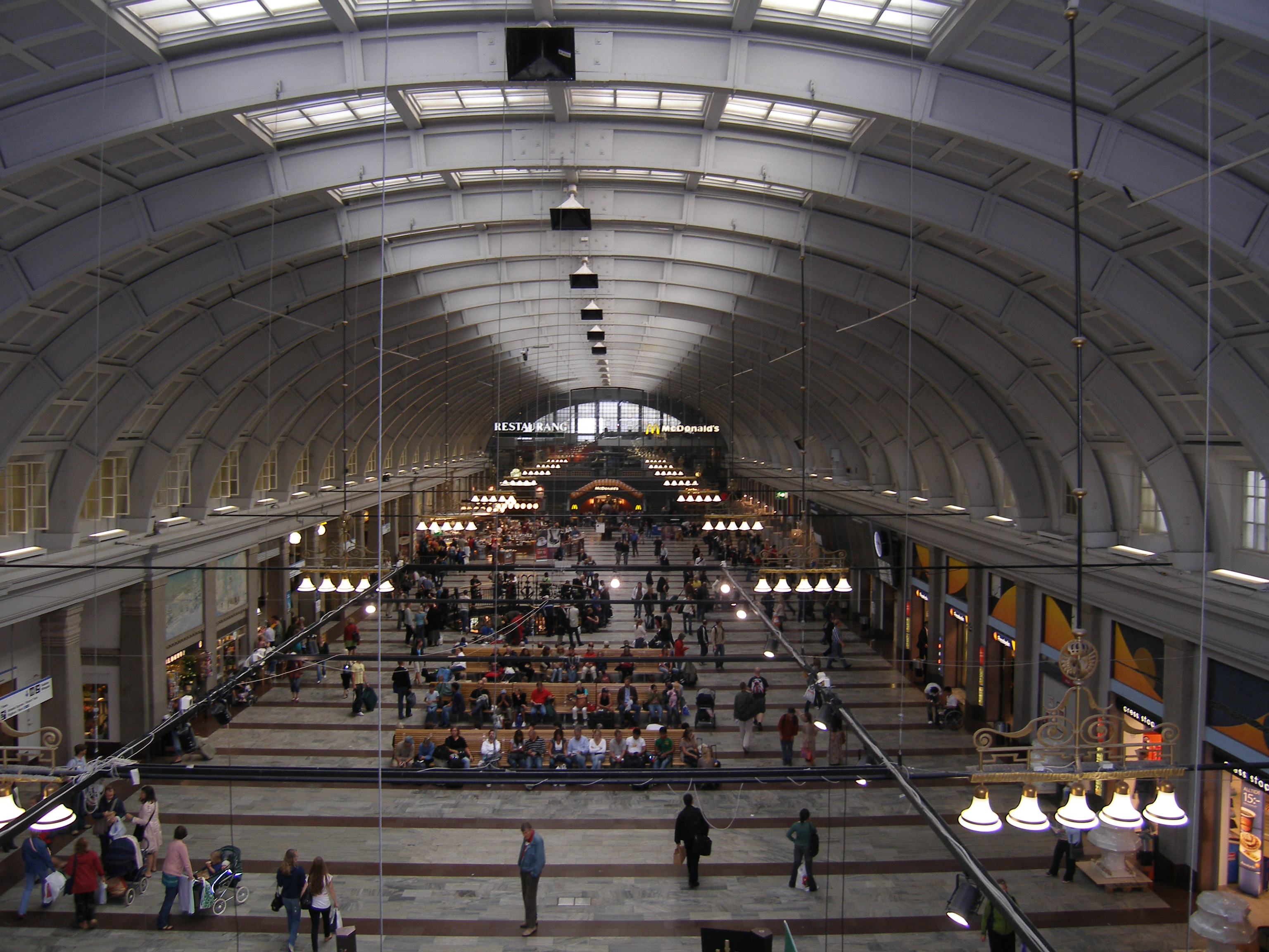 Hal Stockholm Centraal